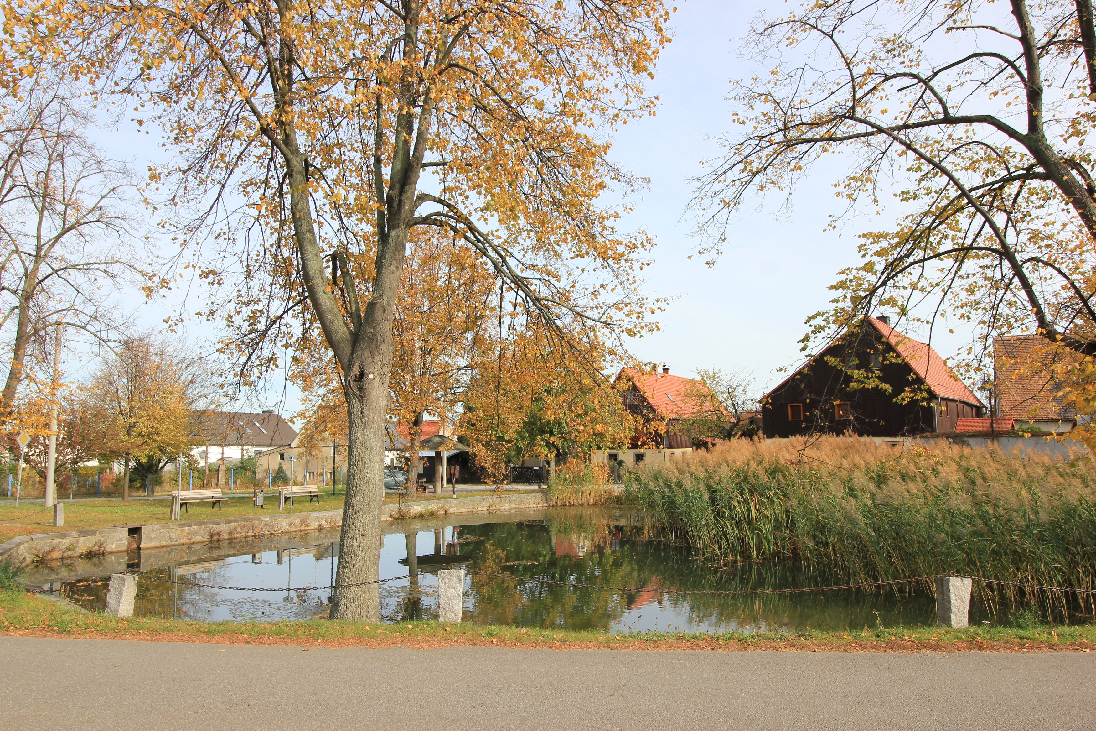 Hornjoserbsce: Zajdow; wjesny hat na nawsy.